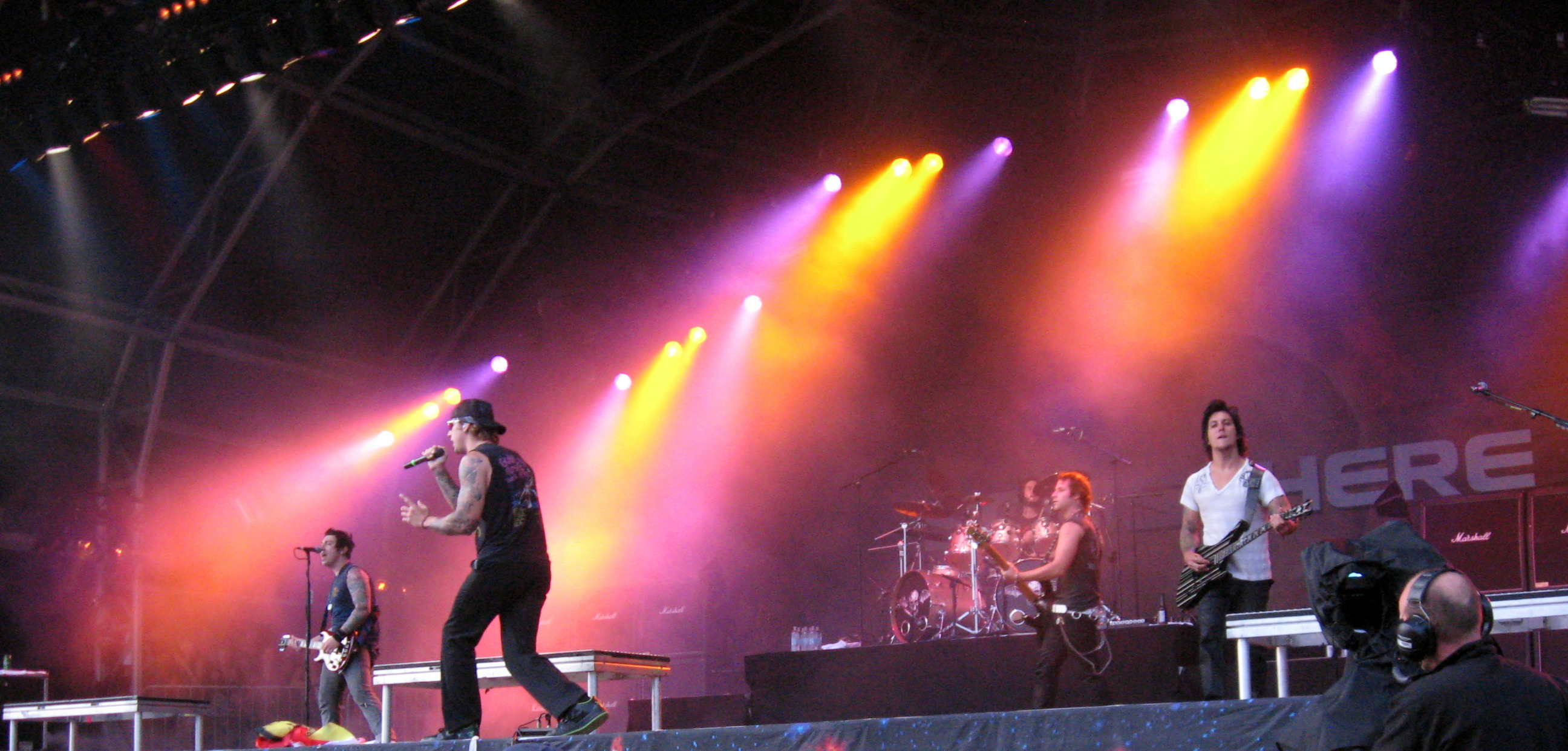 ME MEDESIMO, 2 AGOSTO 2009